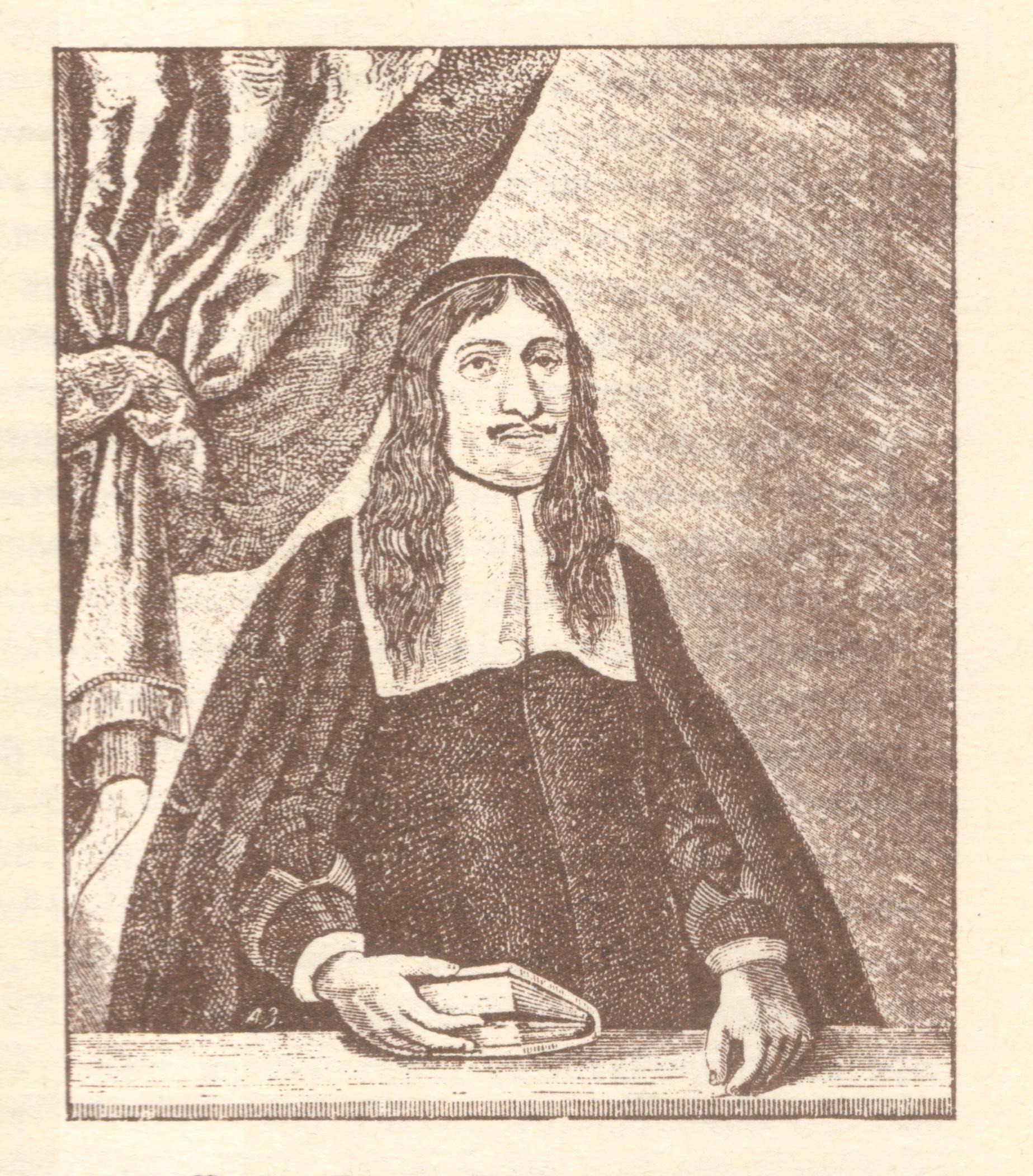 Johann Gottfried Gregory (1631-1675)